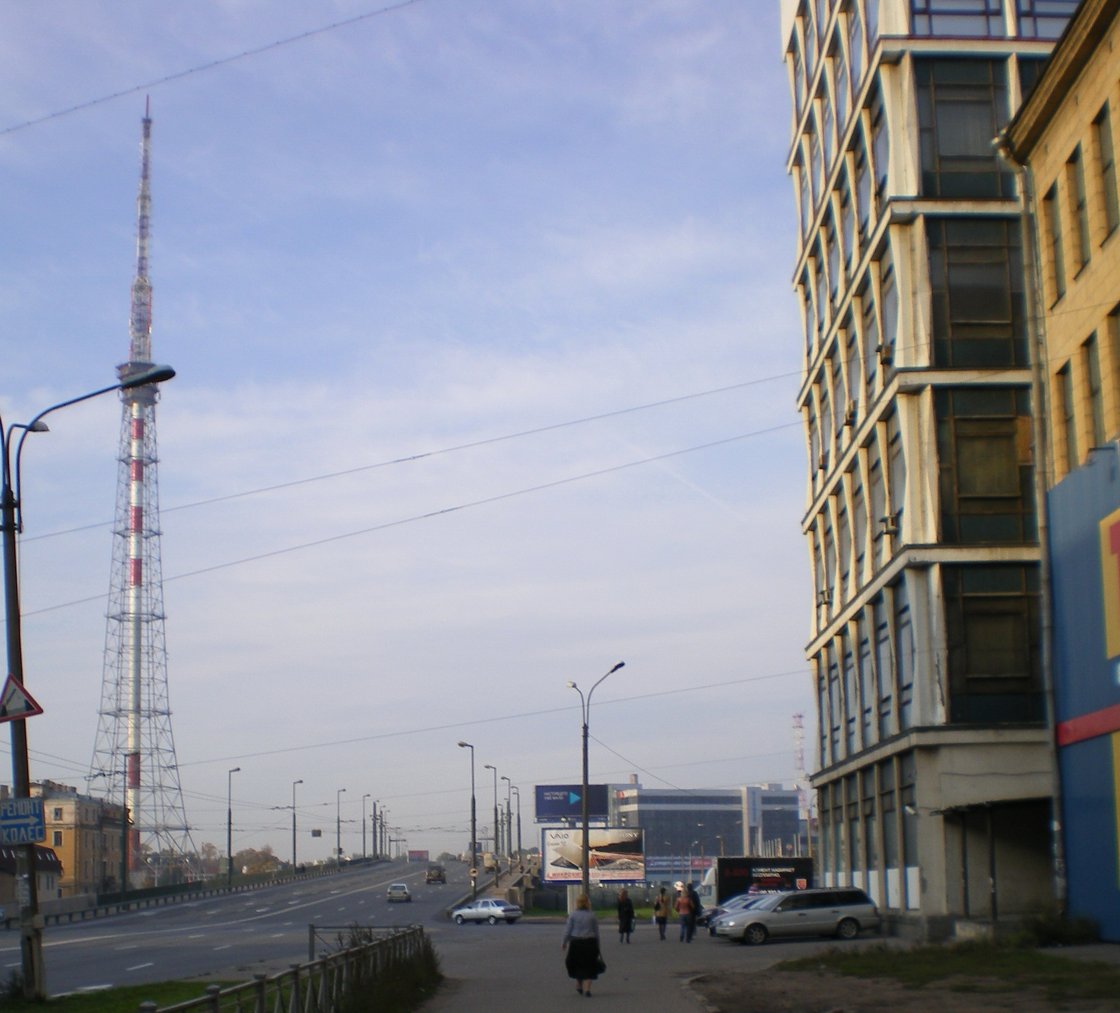 Кантемировская улица в сторону Кантемировского моста. Телебашня.